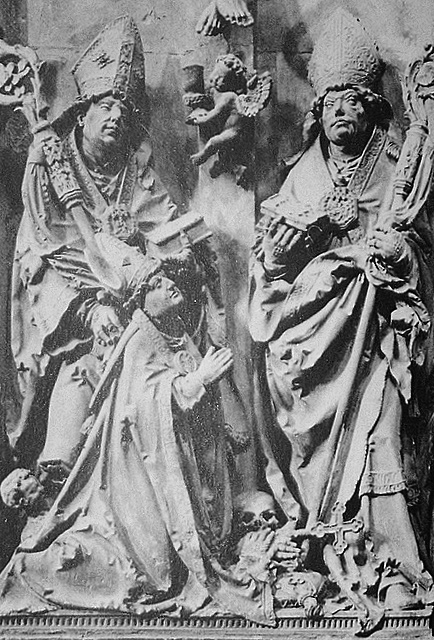 Epitaph Uriel von Gemmingen im Mainzer Dom, geschaffen von Bildhauer Hans Backoffen. Der Kopf Uriels wurde 1831 von Joseph Scholl erneuert. Das Werk ist der Spätgotik (1350-1520) zuzuordnen.